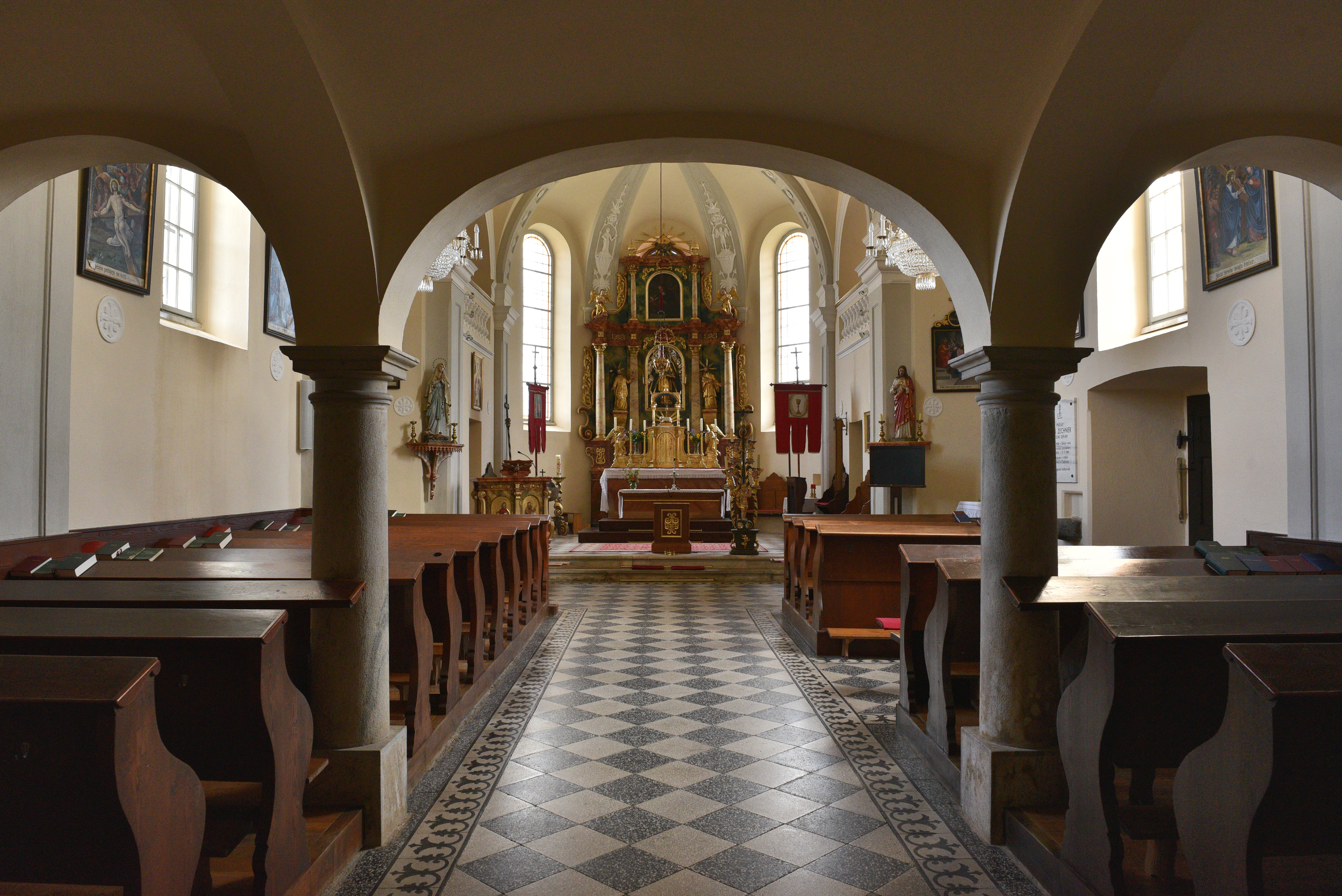 Pfarrkirche Schwabegg, Gemeinde Neuhaus Die Kirche steht im zweisprachigen Gebiet Kärntens, slowenisch sind nicht nur die Heiligenbilder und Statuen beschriftet, auch die Kreuzwegbilder sind mit slowenischer Inschrift. Am Friedhof der Pfarrkirche steht das Familiengrab der Freiherrn von Webern, unter anderem mit der Grabplatte des Komponisten Anton von Webern.